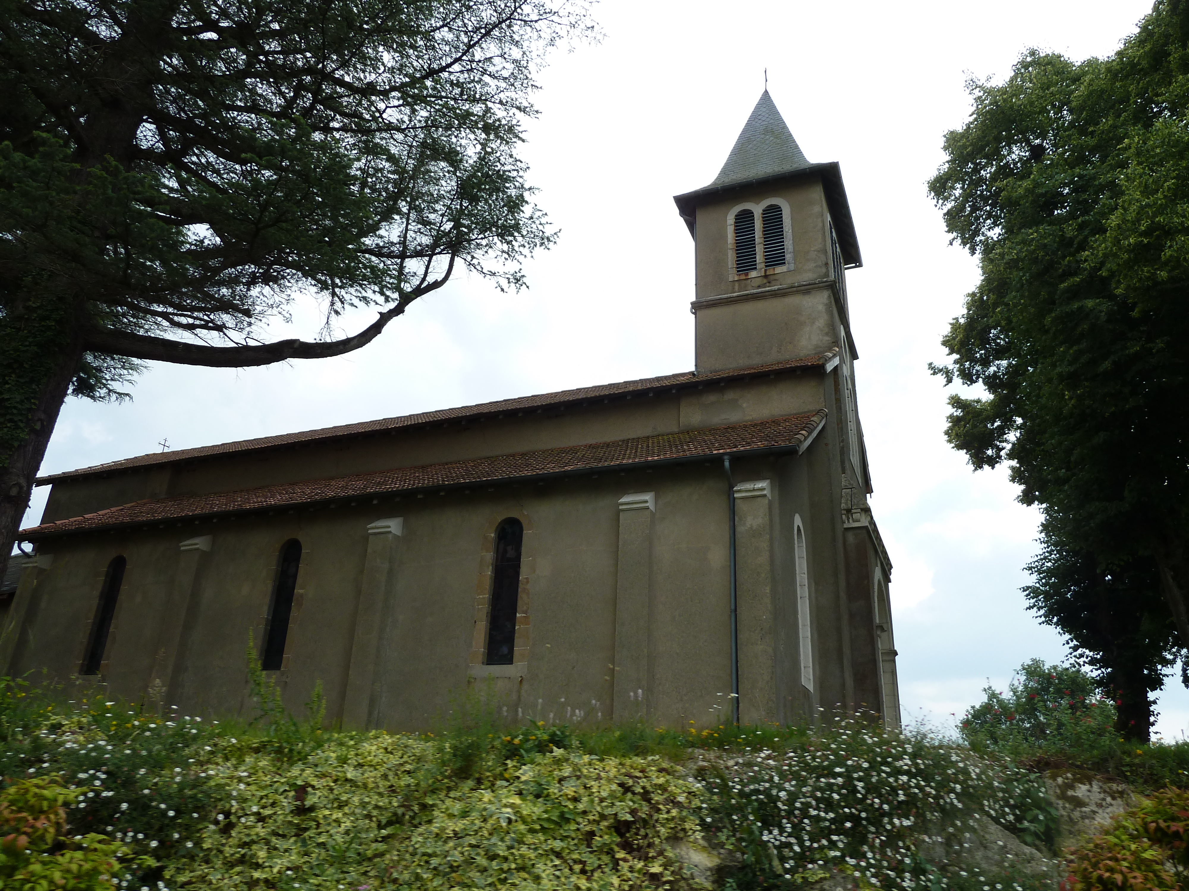 Église de Moncaup (Pyrénées-Atlantiques)